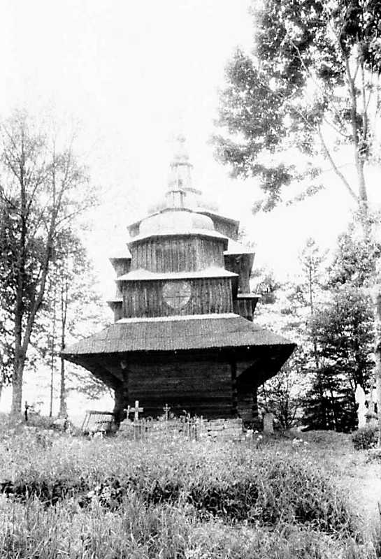 Церква Святої Трійці в с. Матків